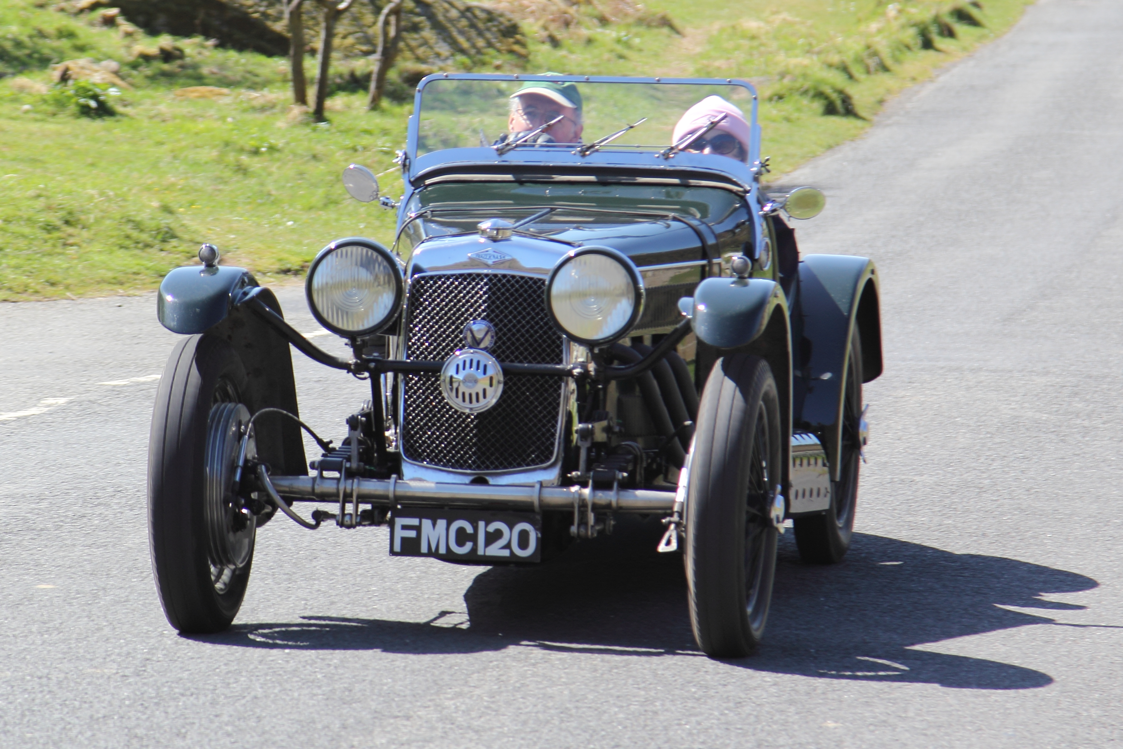 1936-1937 Frazer Nash Ulster 100